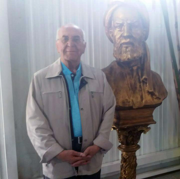 فعال سرشناس اقتصادی، کارآفرین منتخب ایران، پایه گذار صنایع غذایی بهروز و بنیانگذار مرکز تحقیقات غذایی ایران